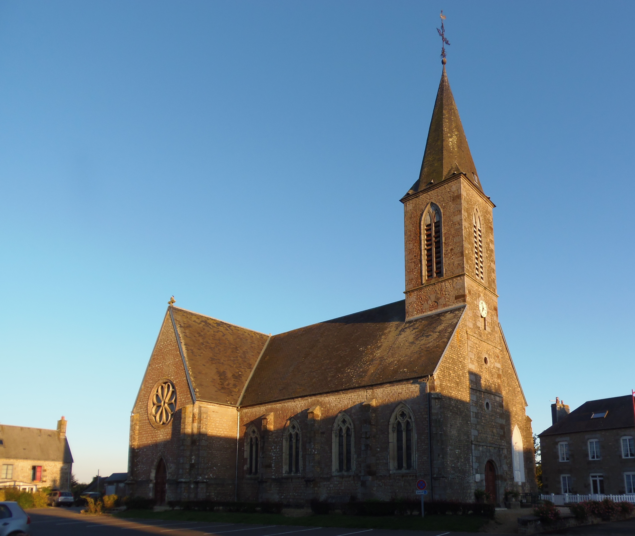 Larchamp (Normandie, France). L'église Notre-Dame.